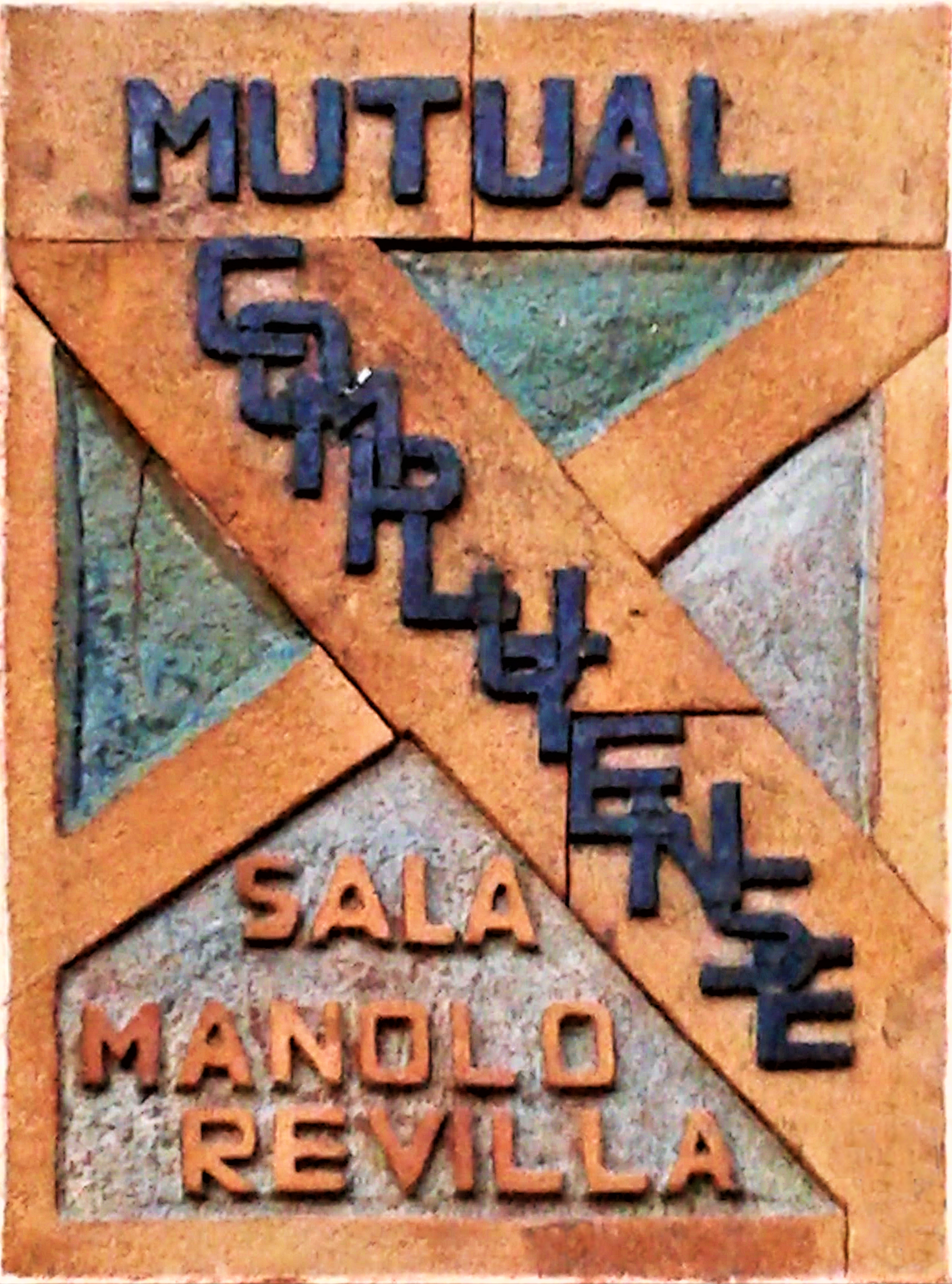 Cerámica de la asociación Mutual Complutense, indicando la Sala de exposiciones Manolo Revilla. Localizada en la calle Nueva, nº 10; de Alcalá de Henares (Comunidad de Madrid - España).